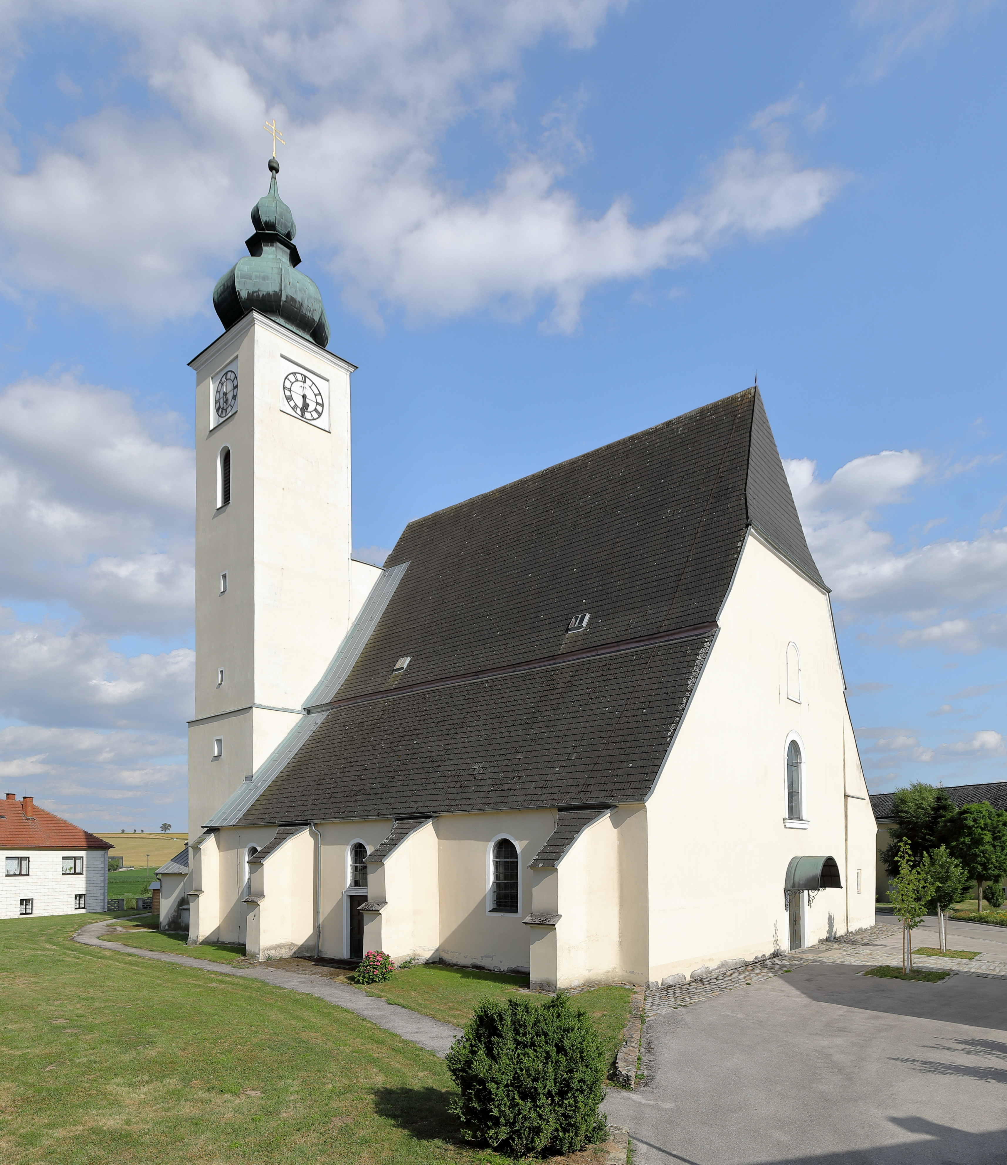 Nordwestansicht der röm.-kath. Pfarrkirche hl. Nikolaus in der niederösterreichischen Marktgemeinde Ruprechtshofen.Eine spätgotische Staffelkirche mit einem Chor aus dem Ende des 13. Jahrhunderts. Der Turm ist ebenfalls spätgotisch, wurde 1653 erhöht und erhielt 1874 eine neobarocke Zwiebelhaube.